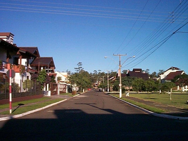 Bairro Getulio Vargas